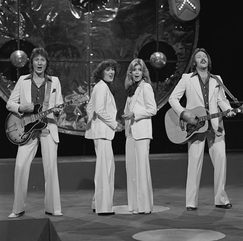 Brotherhoof of Man in het Nederlandse televisieprogramma Kwistig met muziek in 1977